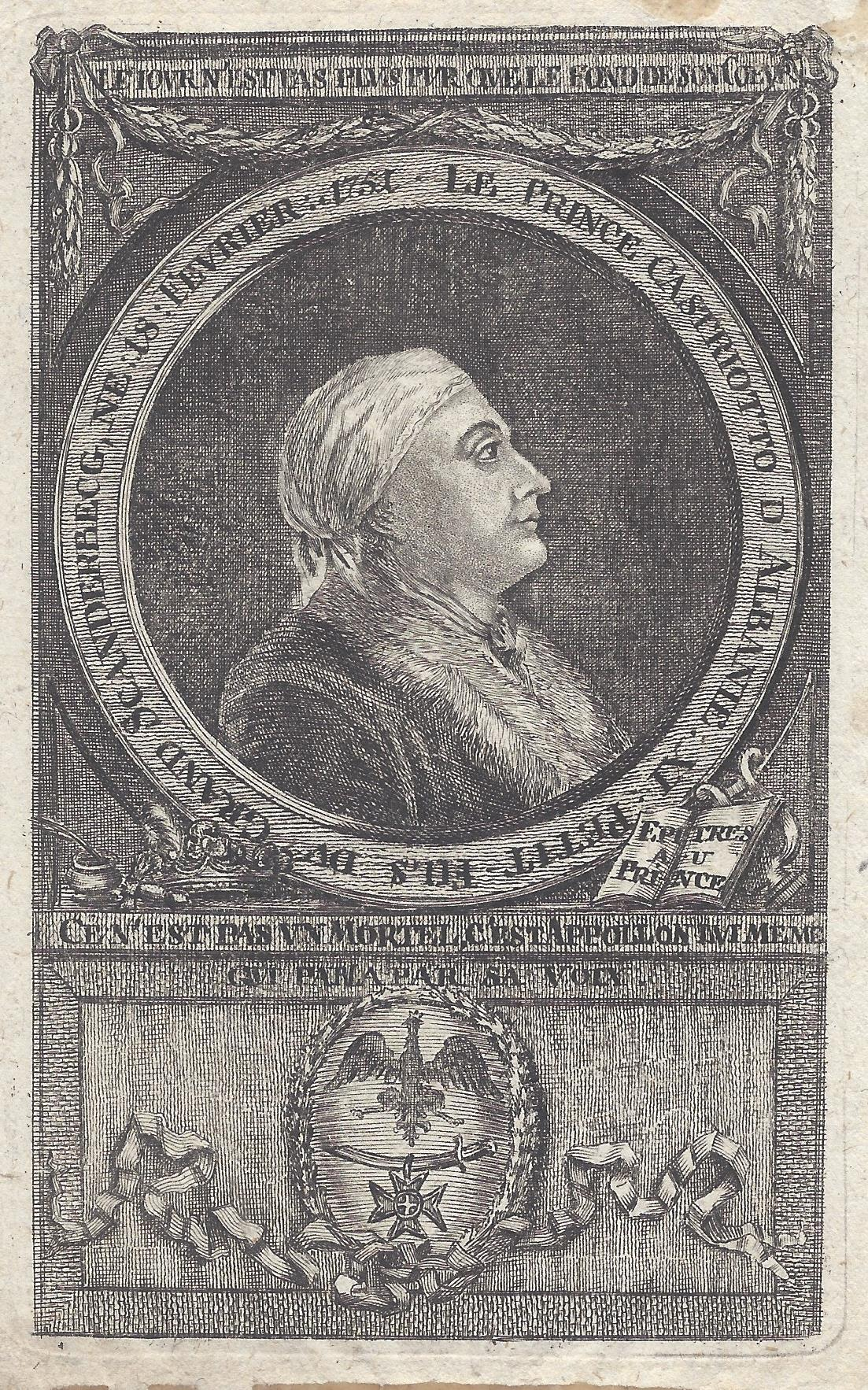 Anonym: Stefano Zannowich, Kupferstich um 1780.